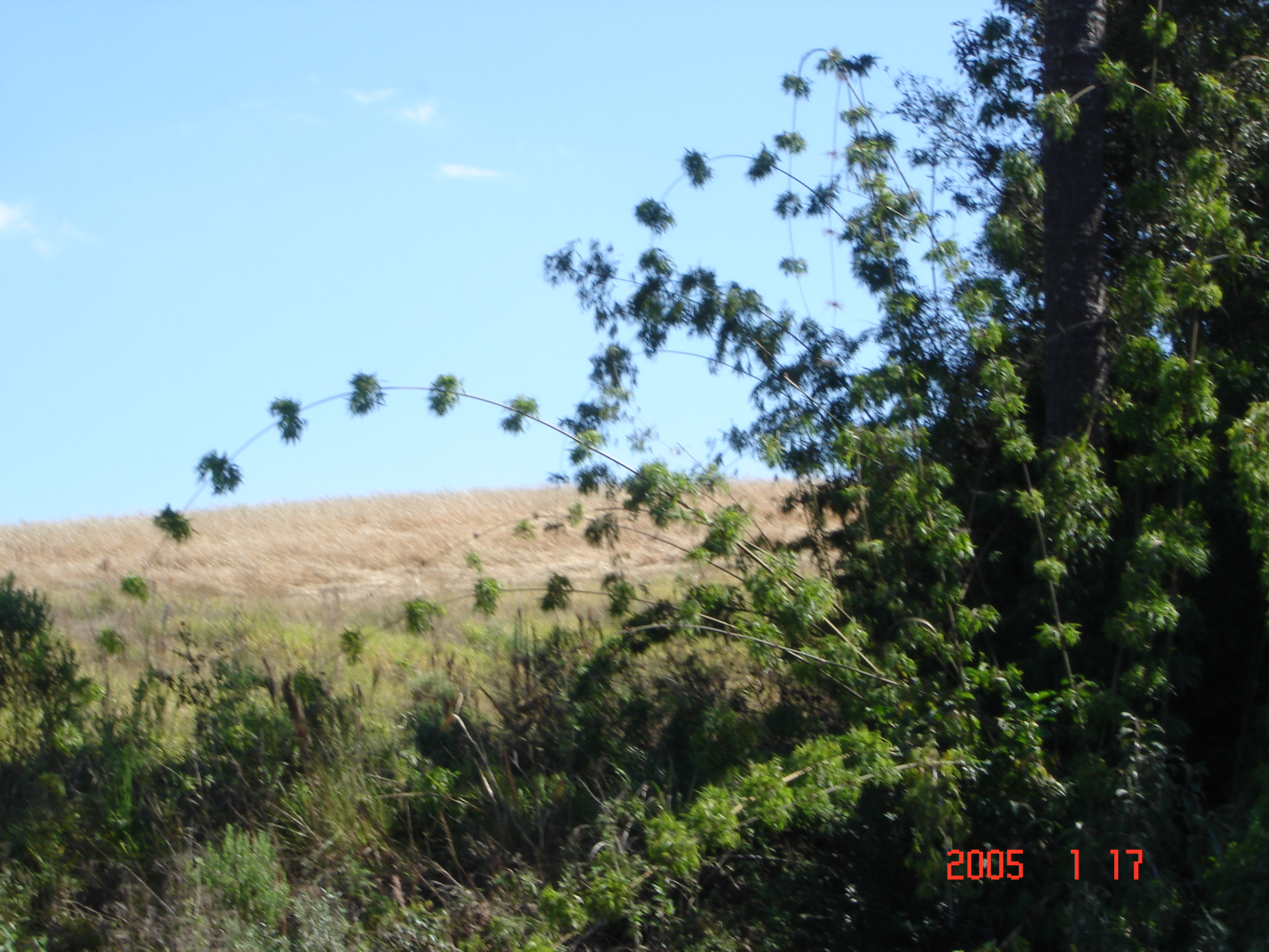 Taquara (fito) - foto do autor que cede todos os direitos ao Commons.